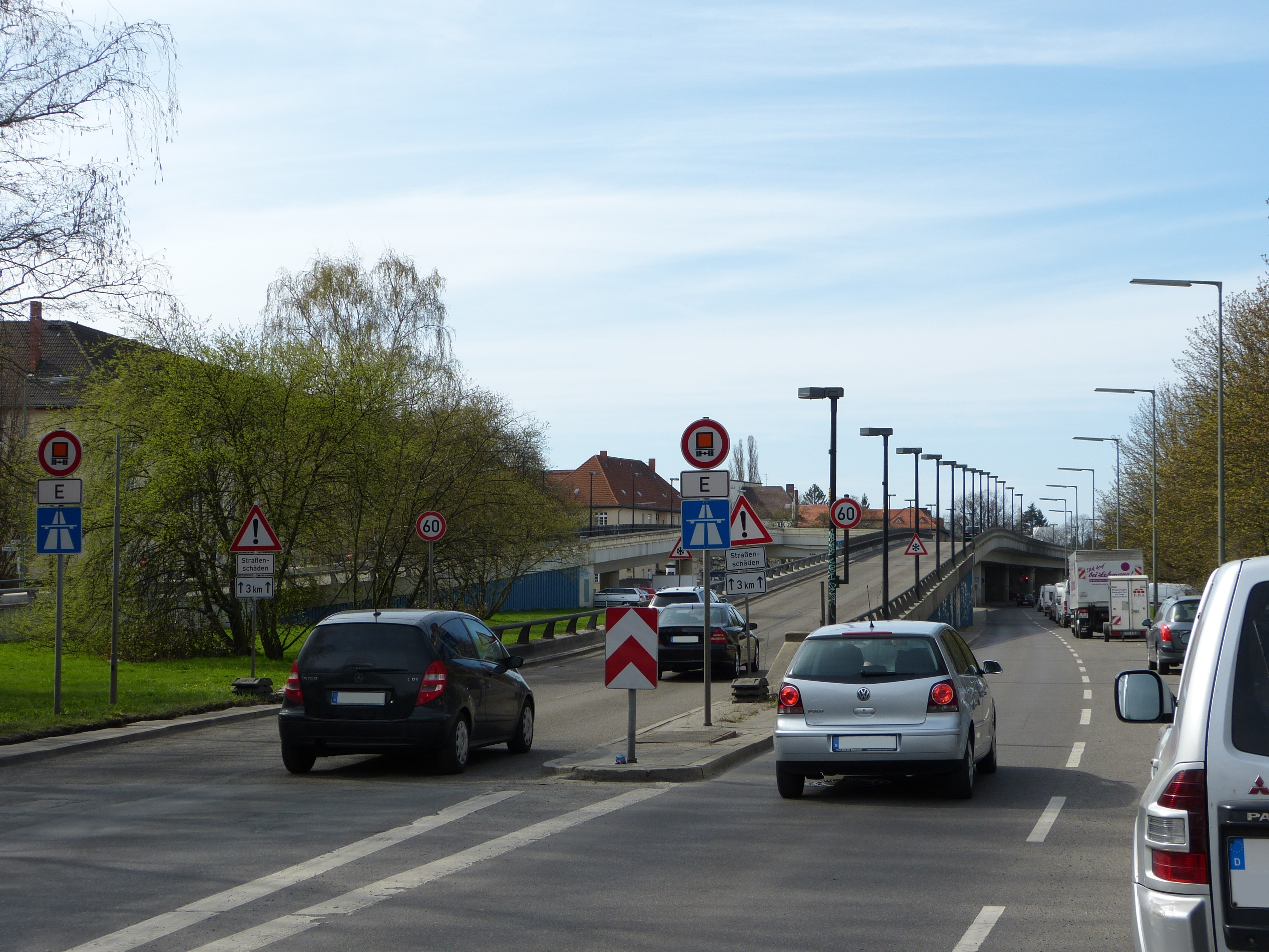 Berlin-Steglitz, Schildhornstraße, Übergang zur Autobahnauffahrt (ehem. BAB 104